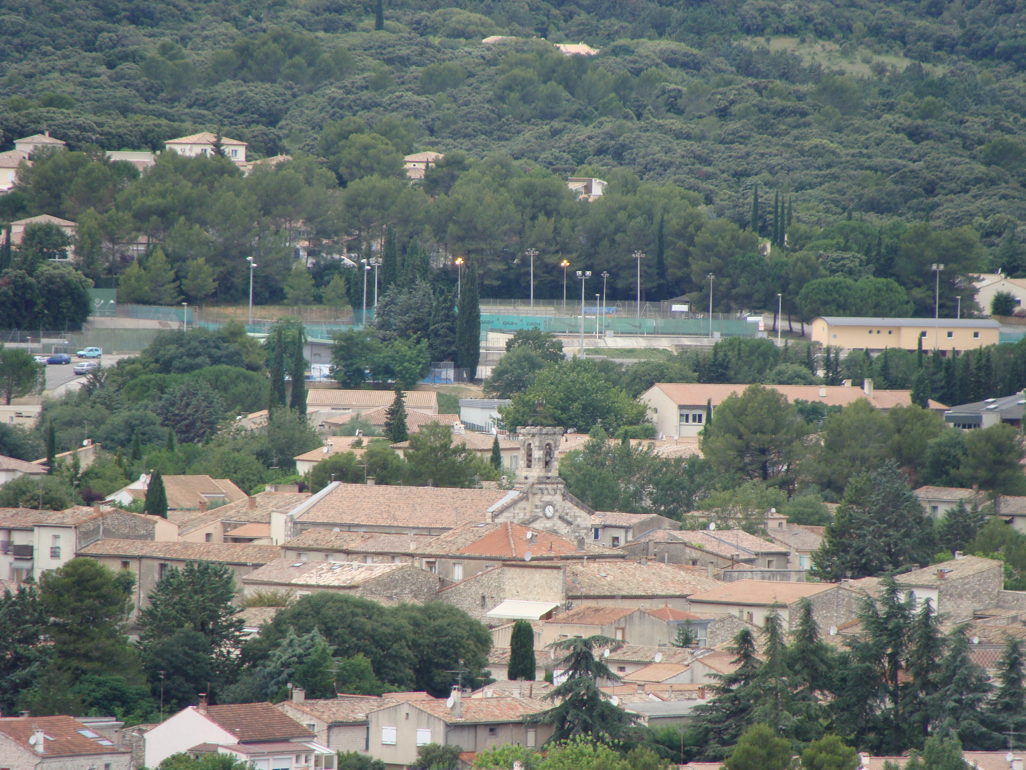 Centre de Saint-Gély-du-Fesc (Hérault)